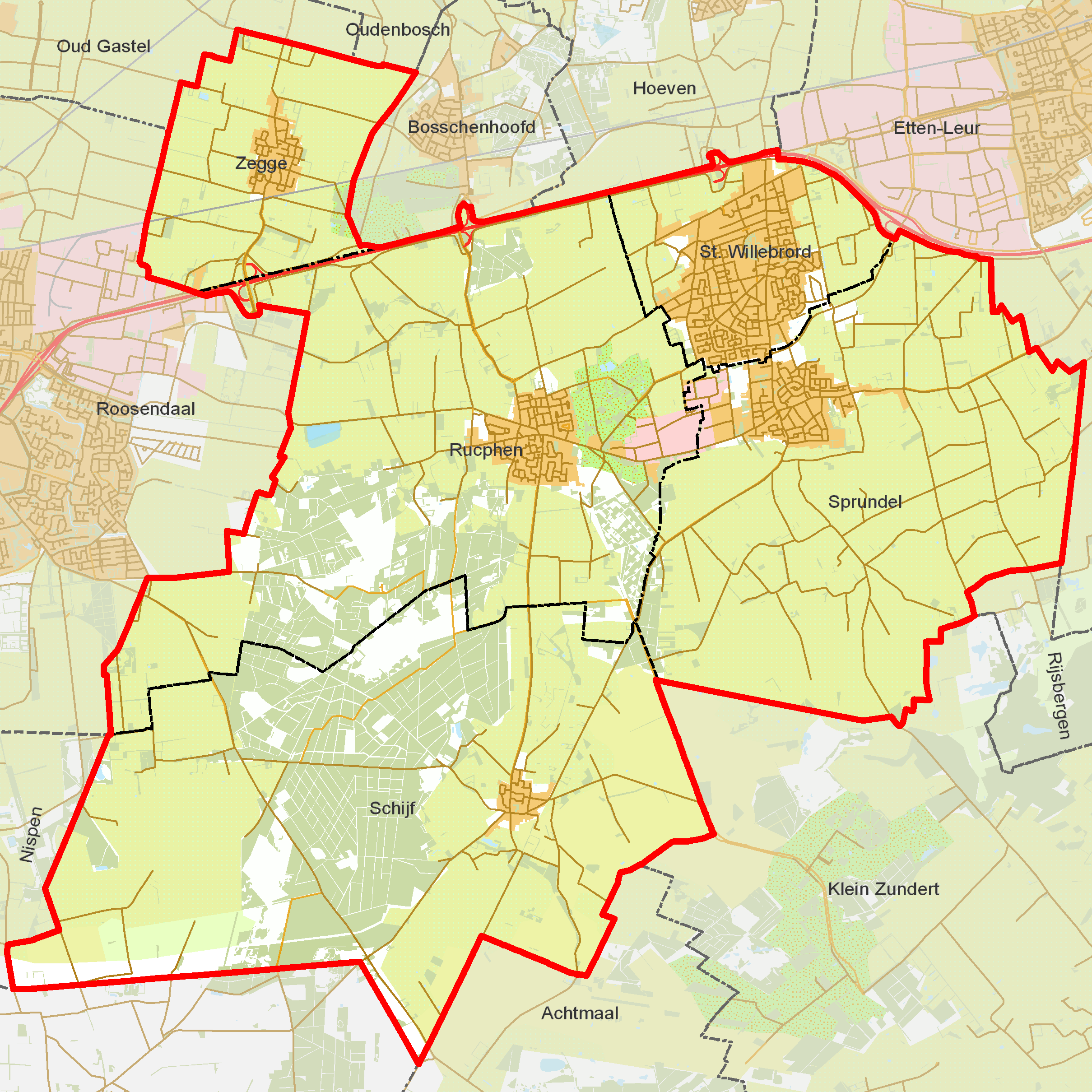 BAG woonplaatsen - Gemeente Rucphen.png